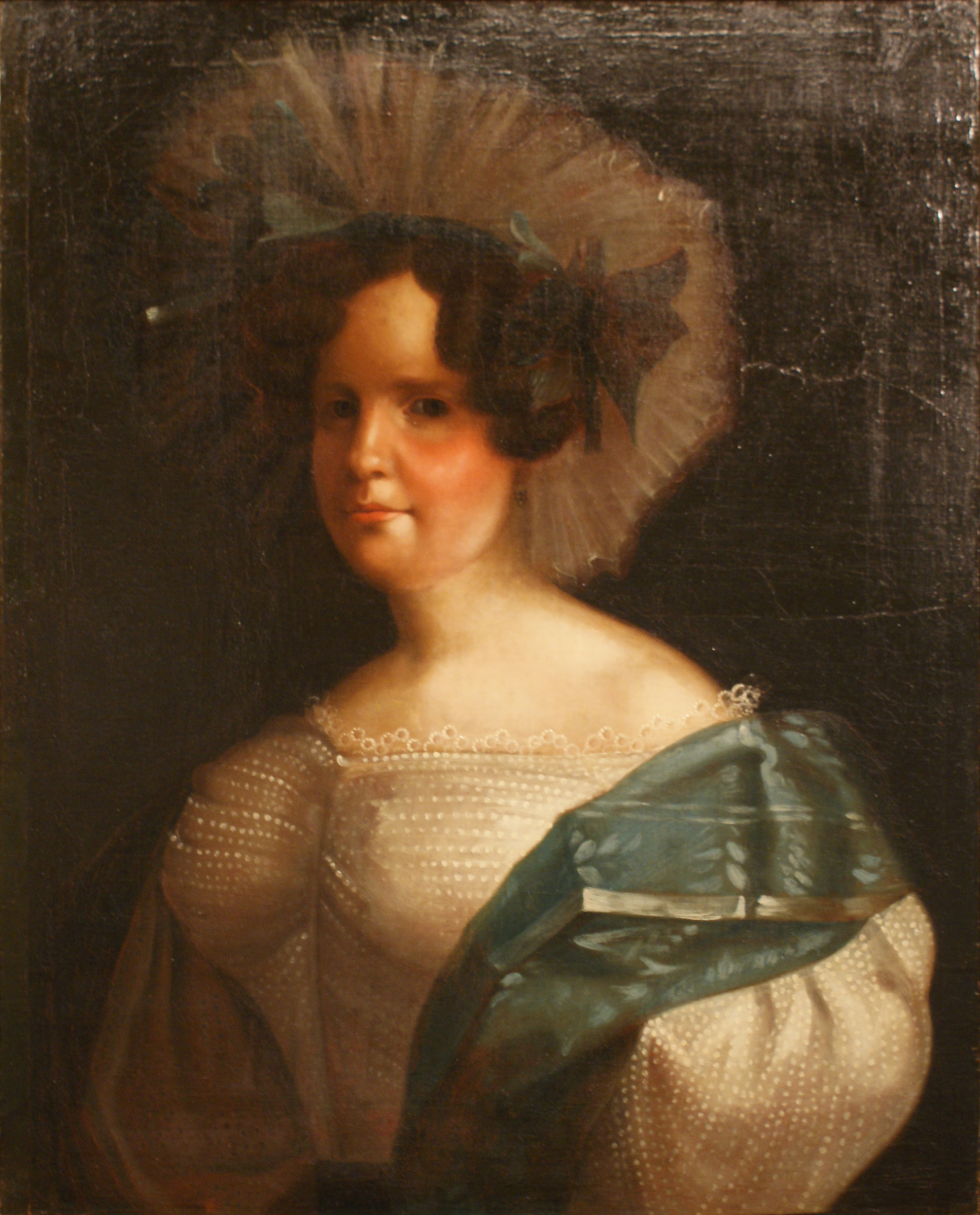 Партрэт Л. А. (Лізаветы) Шахоўскай. Палатно, алей